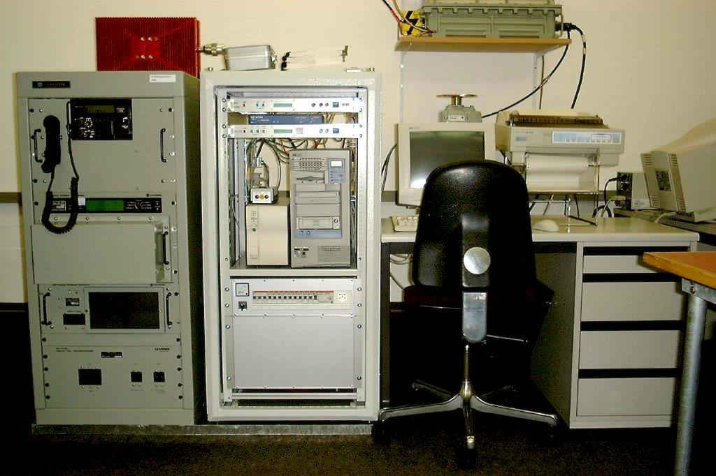 Schweizer Botschaftsfunk - BF Syst 98 - Station der letzten Generation - ASCOM Hombrechtikon und HARRIS RF Corp. USA